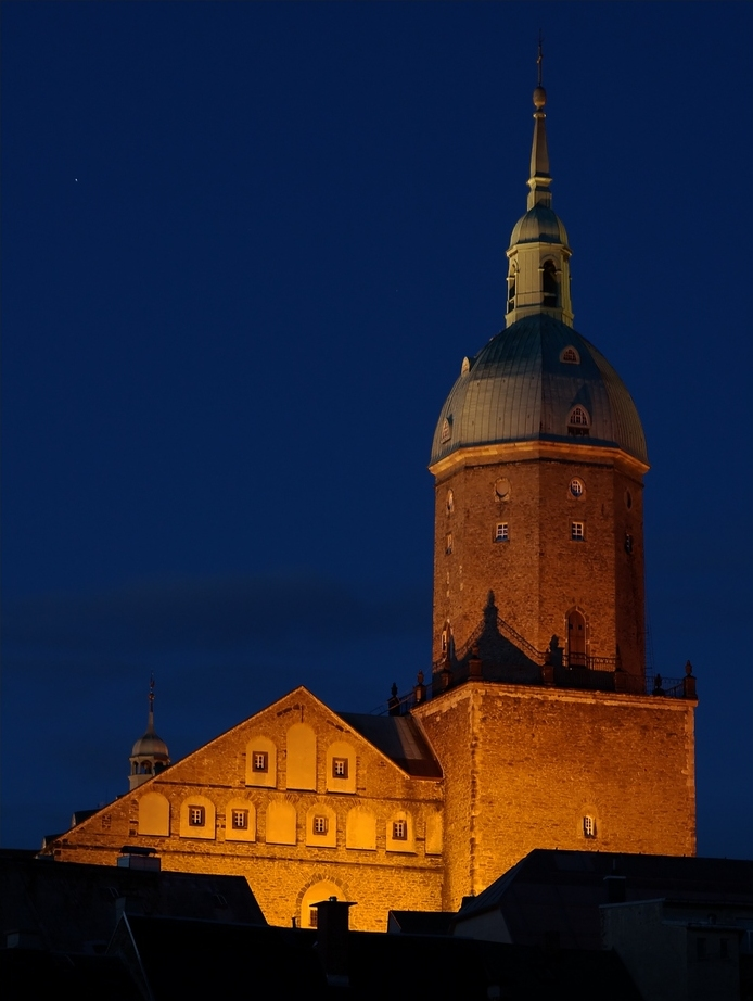 Die Aufnahme zeigt den Kirchturm der Annaberger St. Annen-Kirche.